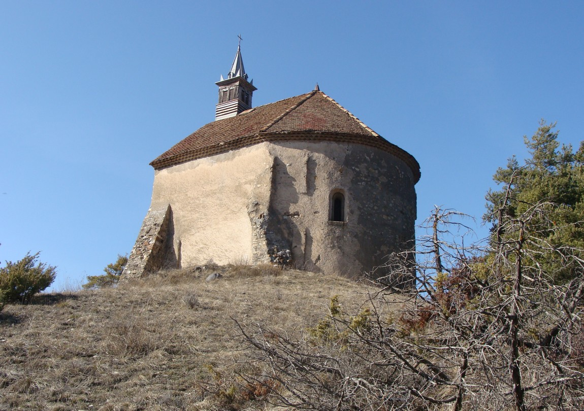 La Chapelle Sainte-Philomène de Montmaur : contreforts, toit couvert en tuiles-écailles, clocheton carré, abside semi-circulaire.